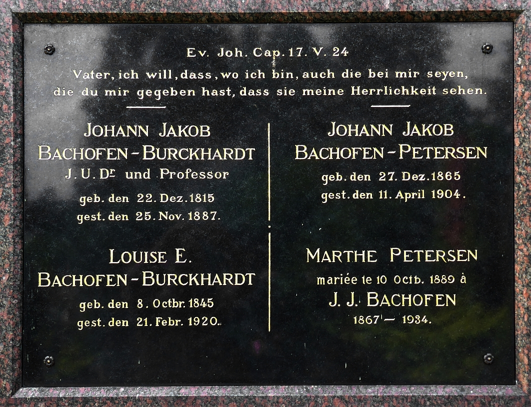 Johann Jakob Bachofen (1815–1887), Rechtsgelehrter, Altertumsforscher, Grabplatte auf dem Friedhof Wolfgottesacker, Basel